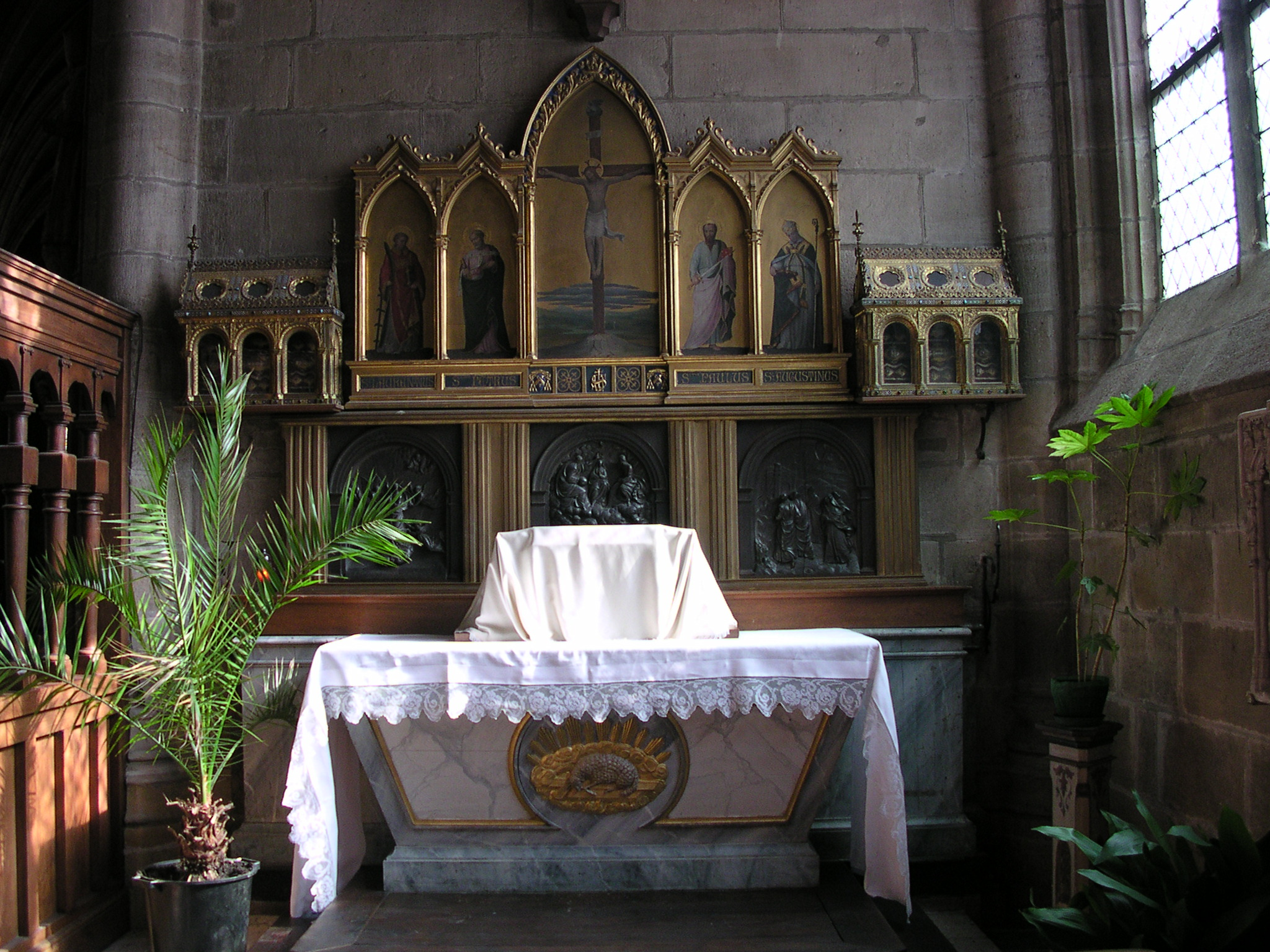 Cathédrale de Moulins (Allier-France) - L'autel du saint-Sacrement. Les trois bas-reliefs, en bois sculpté et du 16e siècle, ornaient la face intérieure du jubé, démoli en 1769. Ils représentent la montée de la Vierge au Calvaire, son Assomption et son Couronnement; classés M.H.